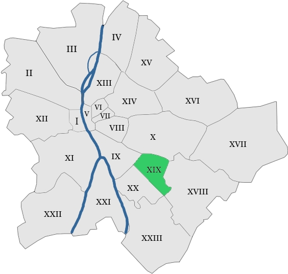 map hungary budapest district 19